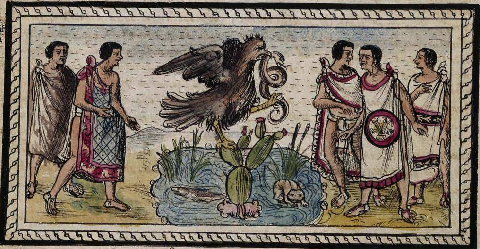 Diego Durán, Historia_de_las_Indias_de_Nueva_España_e_islas_de_la_tierra_firme (Codex Duran) f._14v: foundation of Tenochtitlan